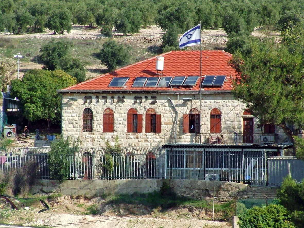 ישיבת בית אורות